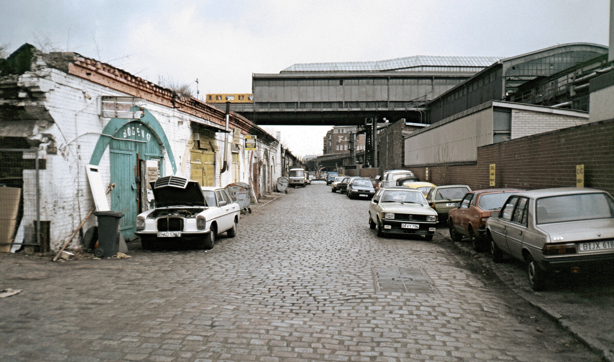 U-Bahnhof Gleisdreieck, Berlin (rechts und oben) sowie Viadukt der Südringkurve (links)